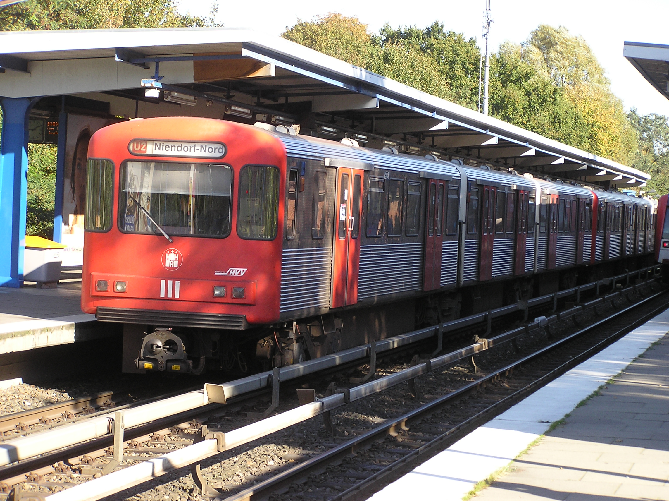 Fahrzeuge der Hamburger Hochbahn im Bahnhof Wandbeks-Gartenstadt